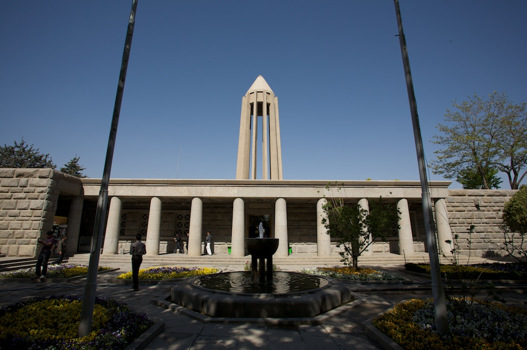 Avicenna Mausoleum